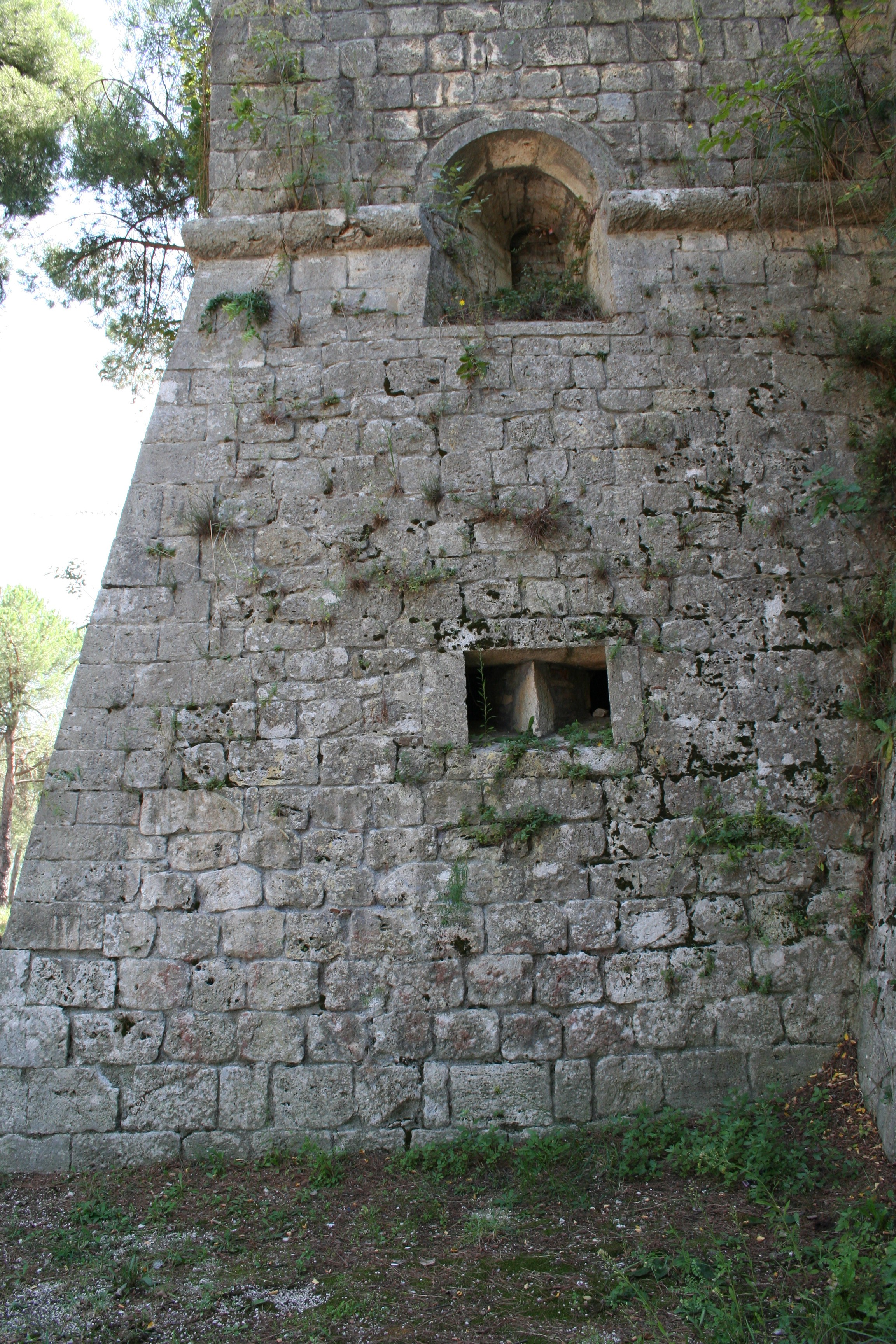 Troniere dei bastioni, Fortezza Pia, ottobre 2006